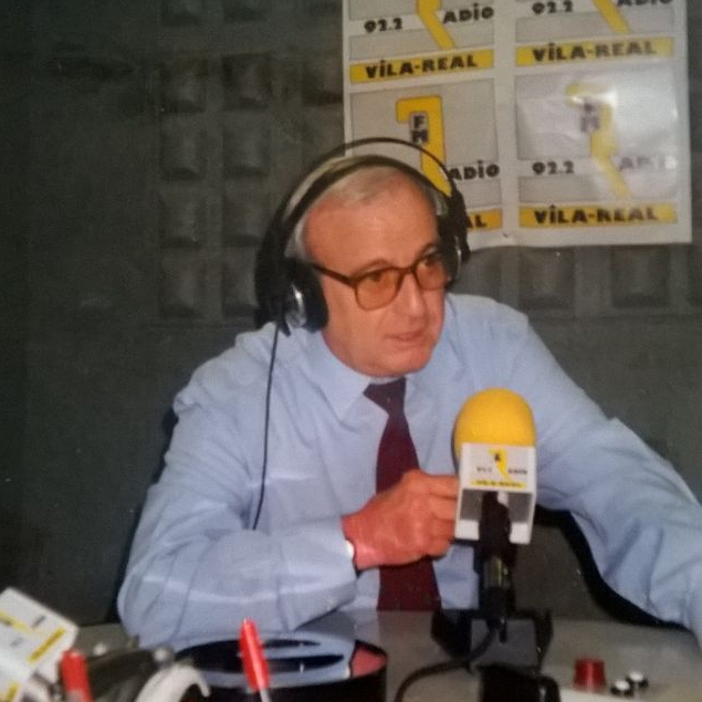 El periodista e historiador deportivo Fernando Peralt.